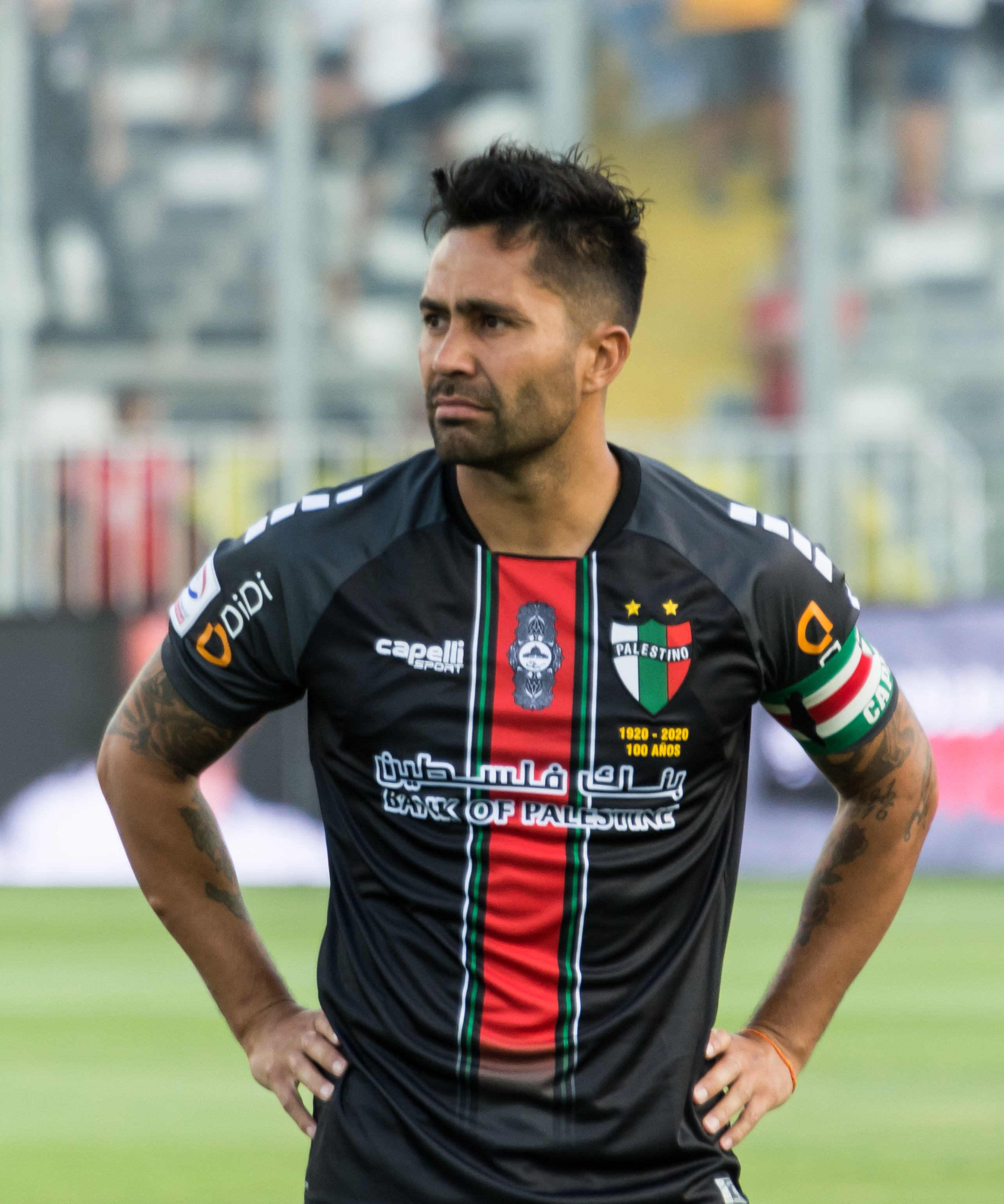 Colo-Colo v Palestino, Estadio Monumental, Macul, Santiago, Región Metropolitana, Chile